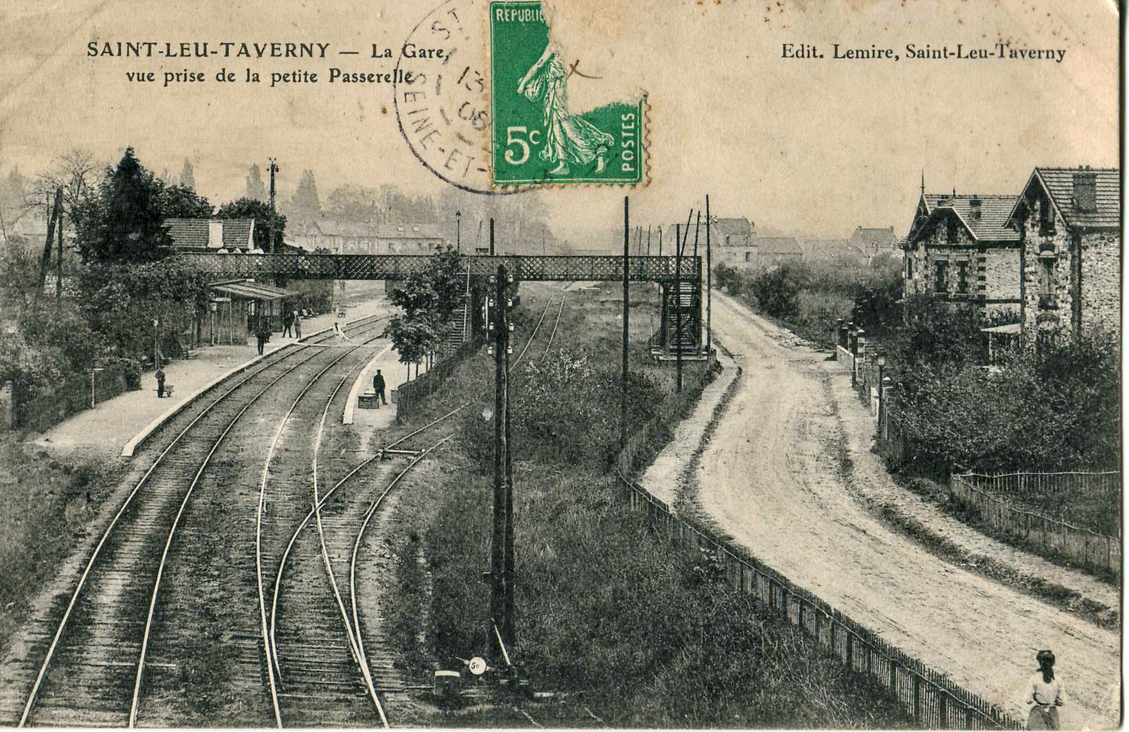 Carte postale ancienne éditée par Lemire à Saint-Leu-Taverny : SAINT-LEU-TAVERNY - La Gare, vue prise de la petite Passerelle